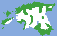 Eesti männimetsade ligikaudne pindala. Männimetsade levik on tähistatud rohelisega.